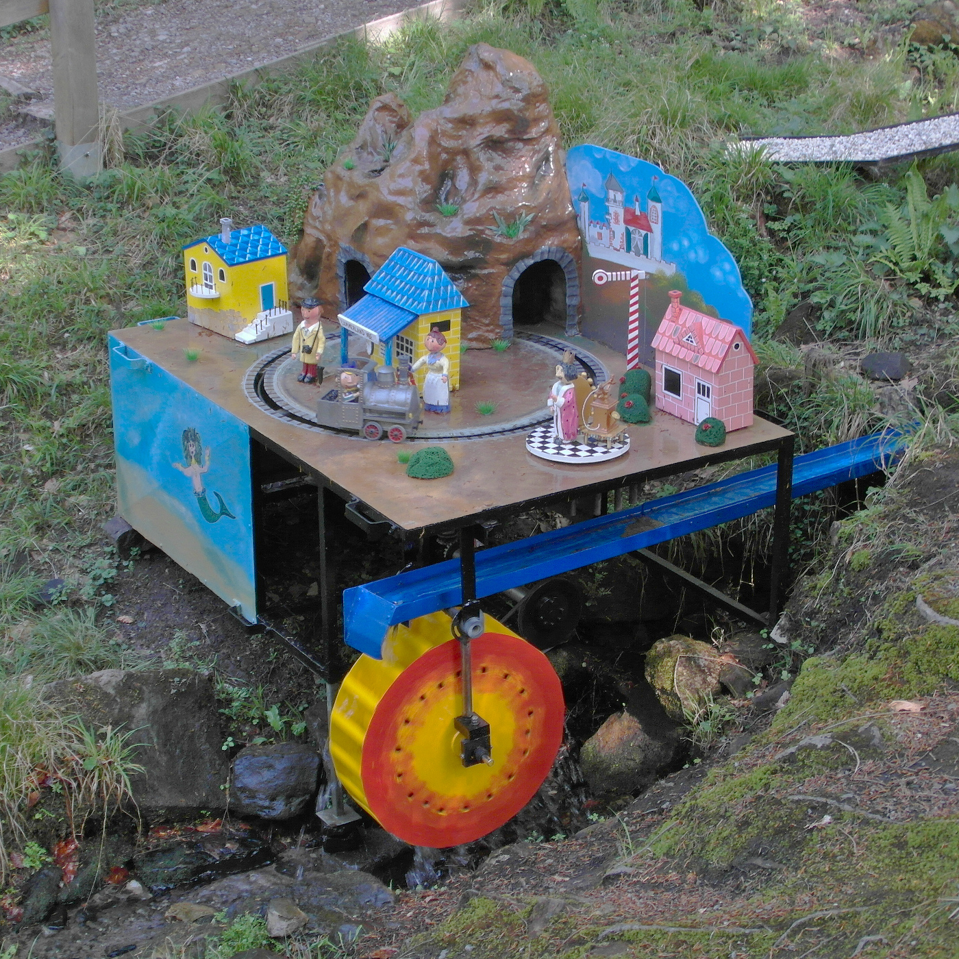 Die Modelle der Wennigser Wasserräder werden jährlich in oft überarbeitetem Design aufgebaut.